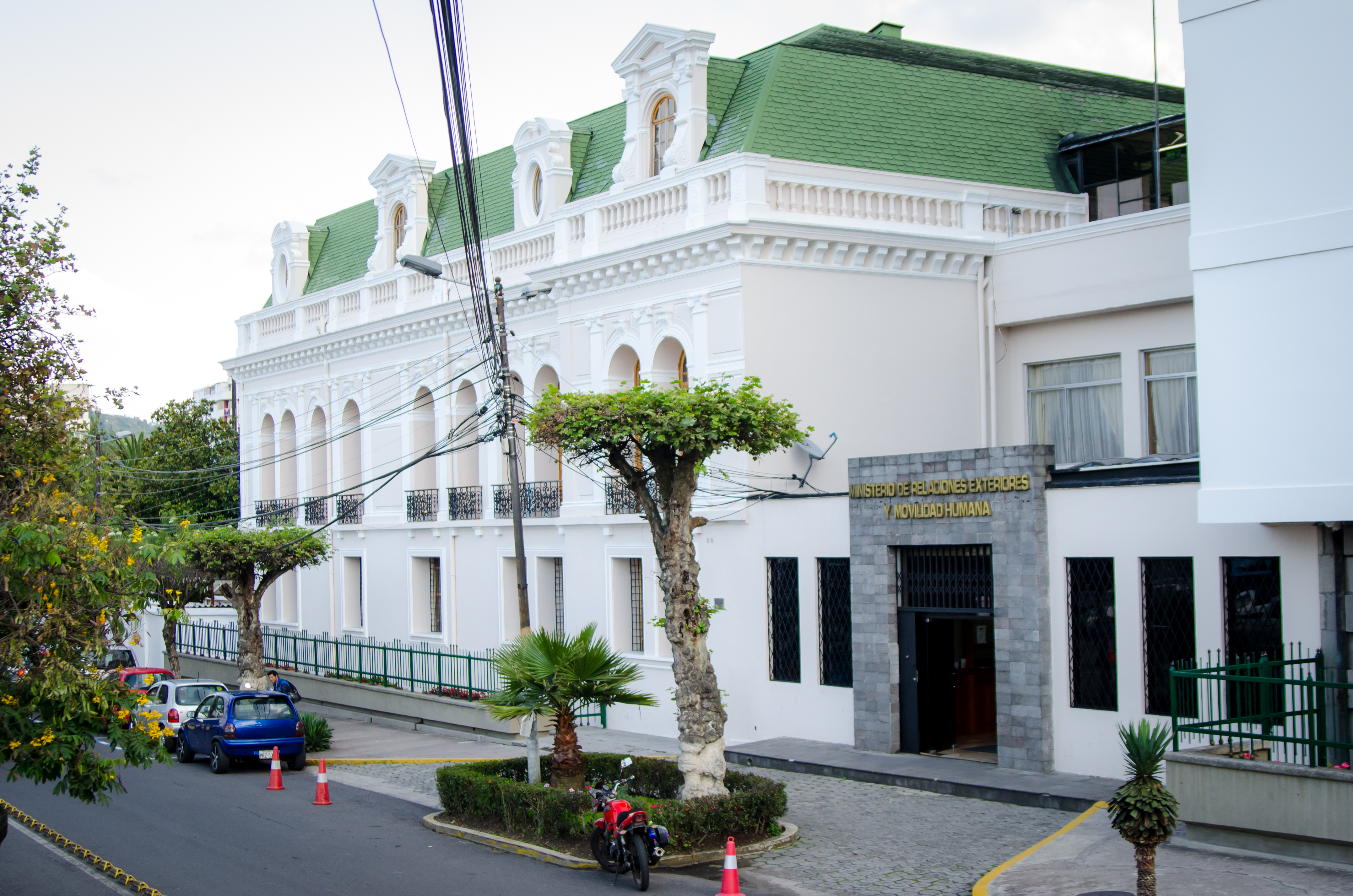 Cancilleria Edificio de la Cancillería del Ecuador